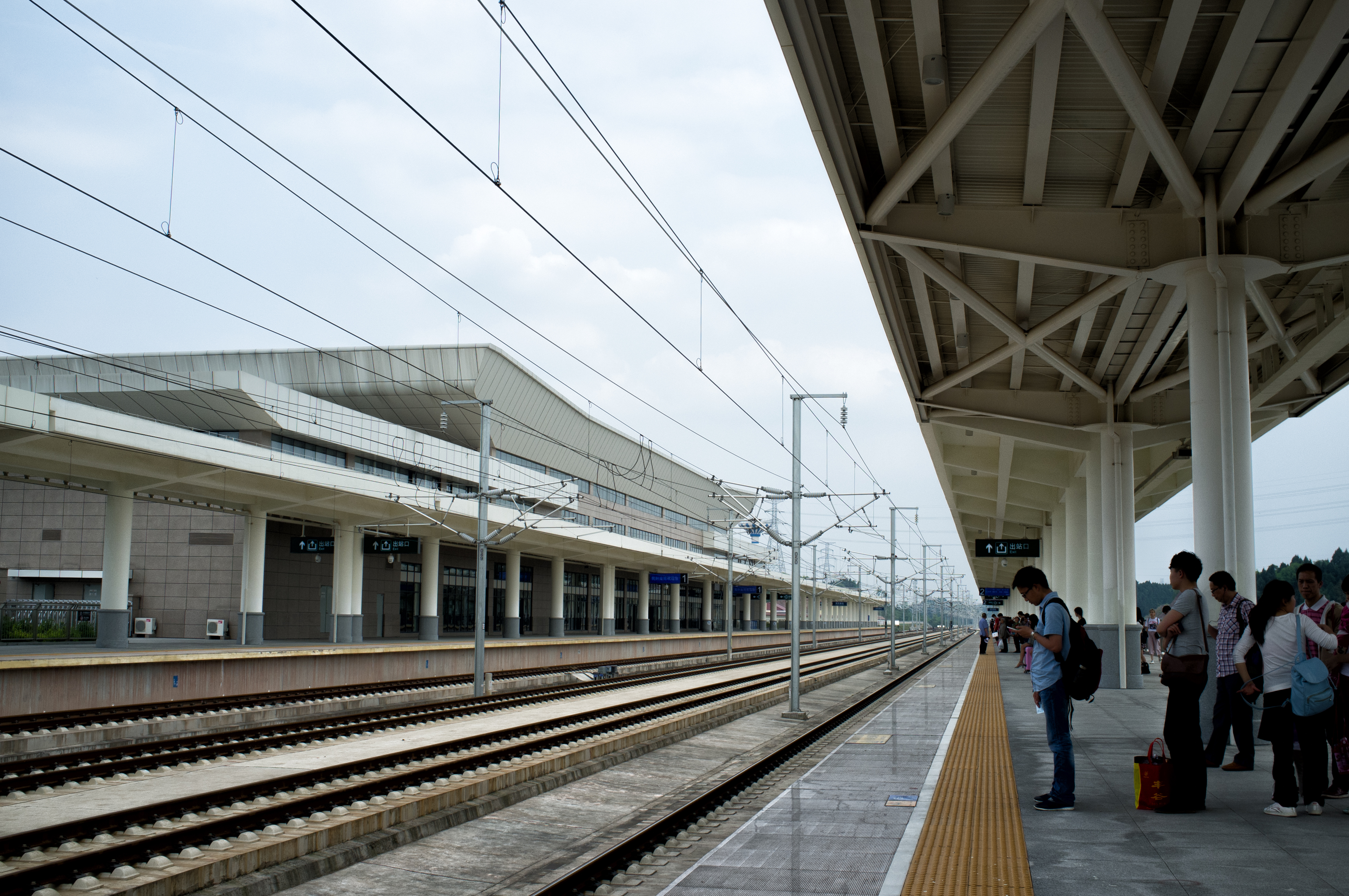 中文（中国大陆）: 国铁成渝客运专线简阳南站2号站台